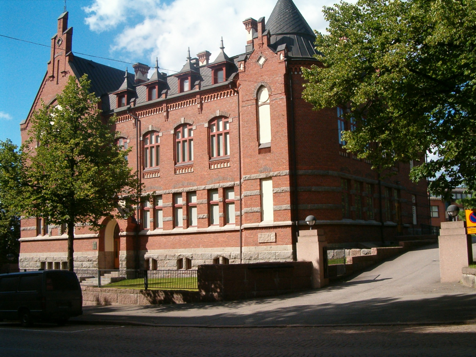 Picture of Lahden Yhteiskoulu's "Museo"